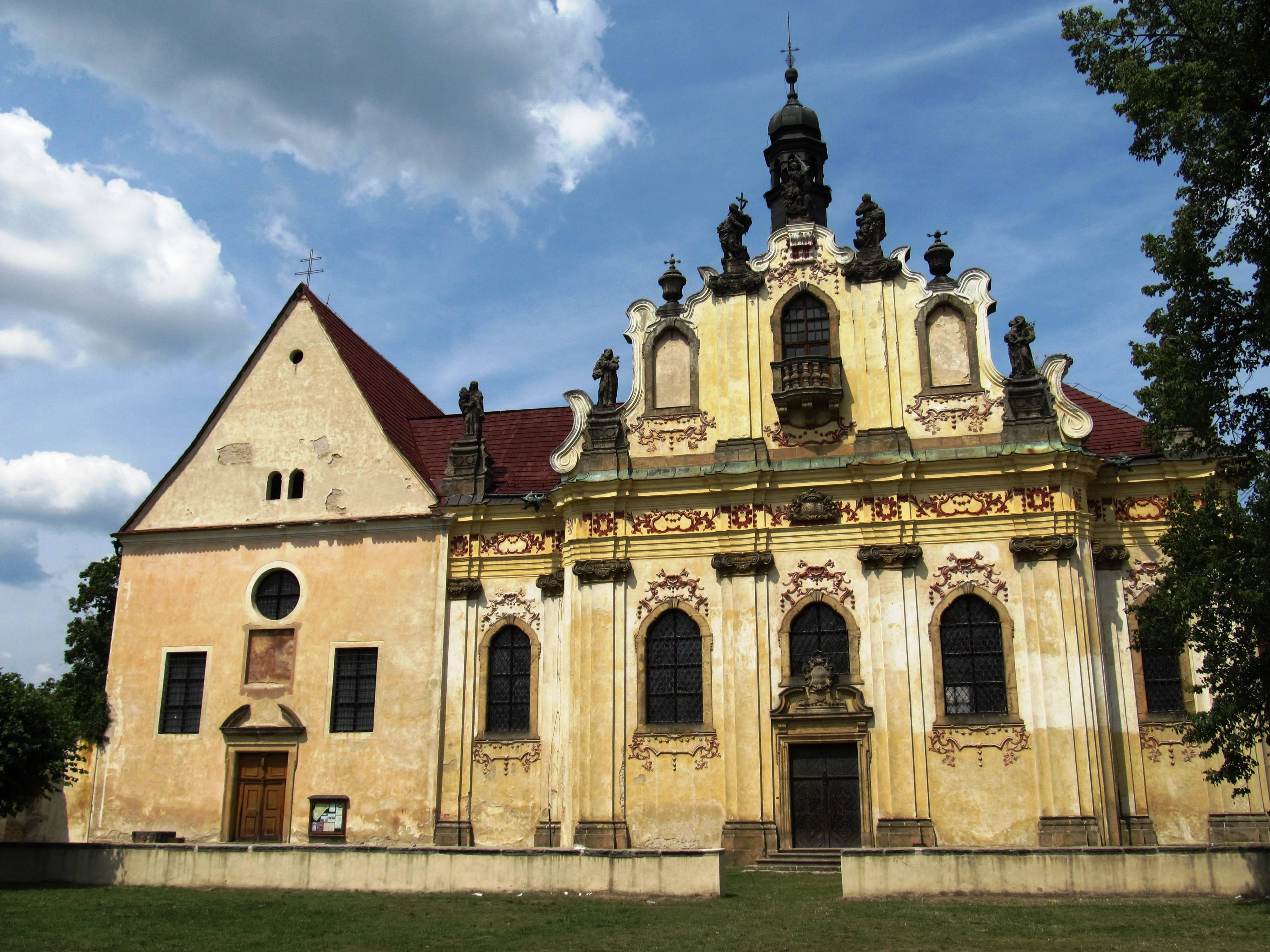 Kaple sv. Anny Mnichovo Hradiště